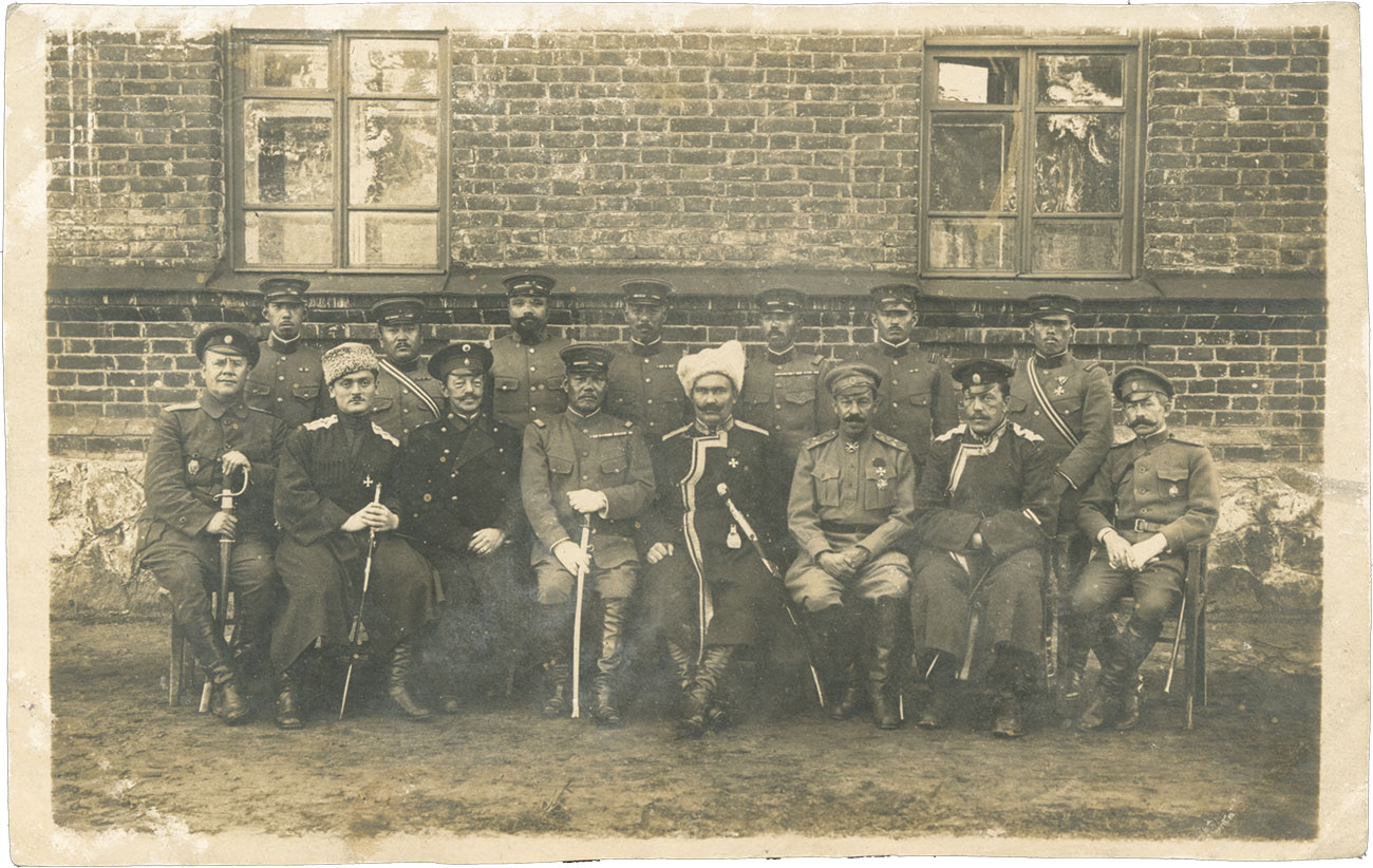 Атаман Г. М.Семенов со штабом Отдельной Монголо-Бурятской им. Зорихто-Батора конной бригады. Поселок Березовка. Нижний ряд (слева на право): неизвестный полковник; подъесаул Торчинов — адъютант атамана; личный врач атамана; генерал-майoр Огата; атаман Г. М. Семёнов; генерал-майор А. В. Мисюра; предположительно Петр Петрович Левицкий, командир бригады им. Зорихто-Батора; подполковник, начальник штаба дивизии генерала Мисюры